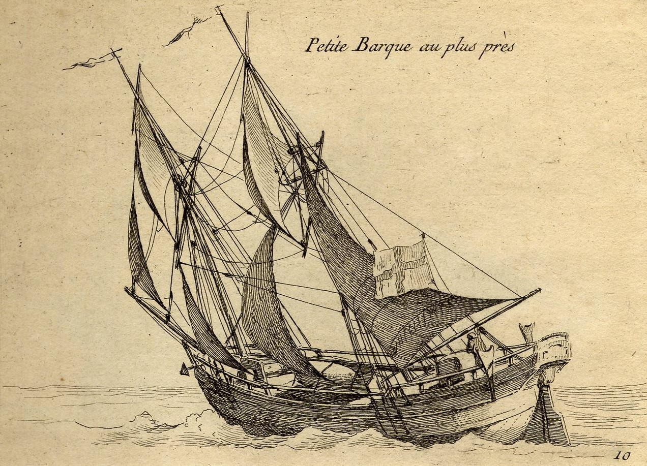 Dessin de Pierre Ozanne, gravé par Yves Le Gouaz. Bibliothèque nationale de France.